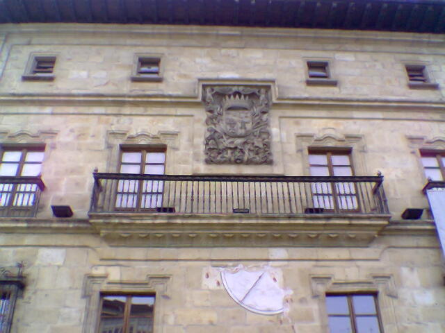 Durango (Vizcaya)-Palacio Etxezarreta-02